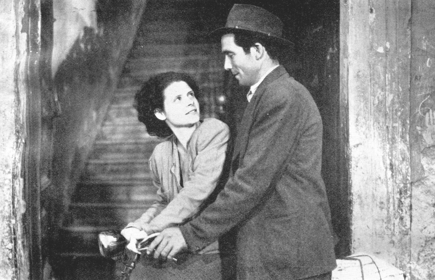 Lamberto Maggiorani e Lianella Carell in Ladri di biciclette (De Sica, 1948)